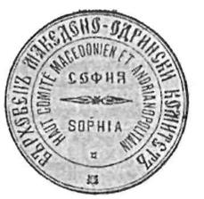 Печат на Върховния македоно-одрински комитет.